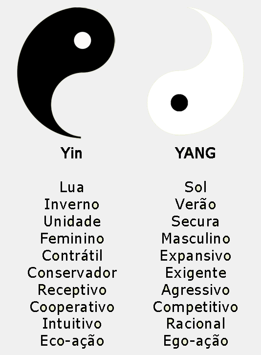 São figuras individuais de yin e yang com seus respectivos significados e descrição.